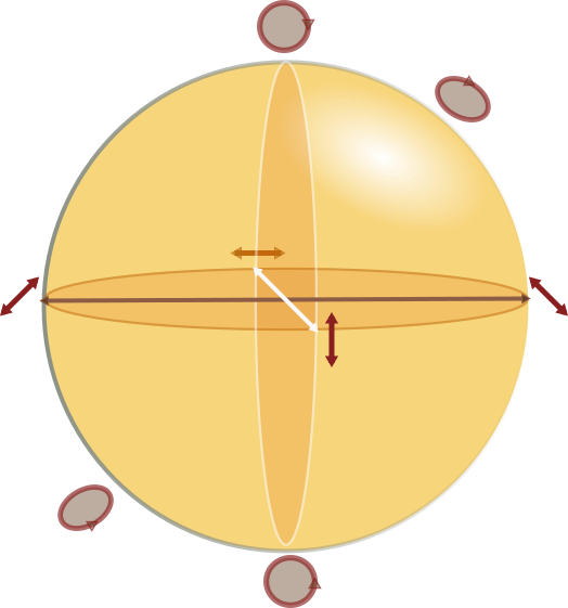 கோளத்தின் மேல் உள்ளப் புள்ளிகள் எவ்வாறு தளவிளைவின் வடிவத்தை மாற்றுகின்றது என்பதை விளக்கும் படம்.